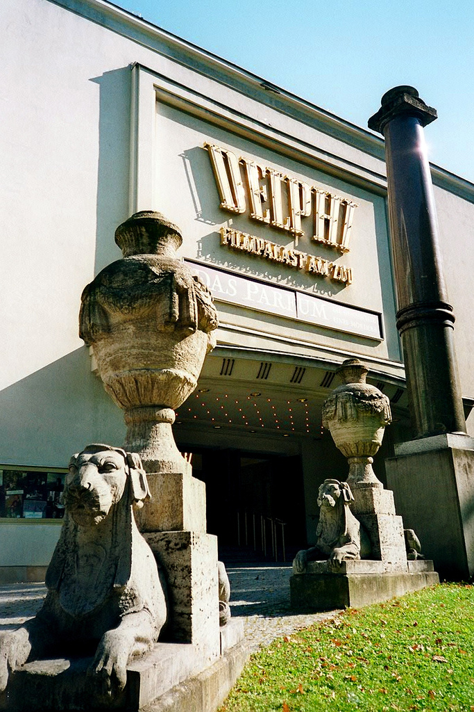 The Delphi Filmpalast in Berlin-Charlottenburg